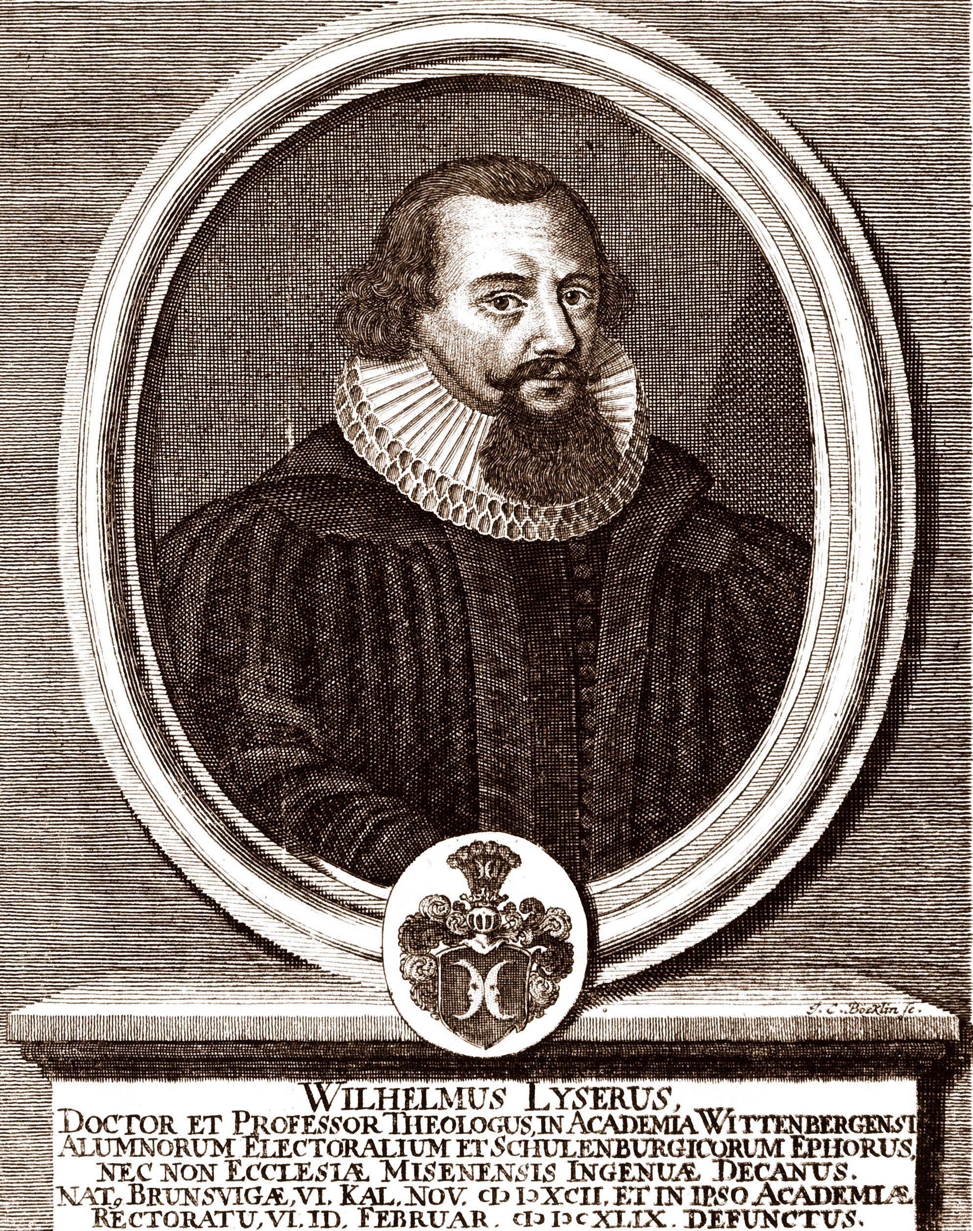 Porträt von Wilhelm I. Leyser (1592–1649), Rektor der Universität Wittemberg